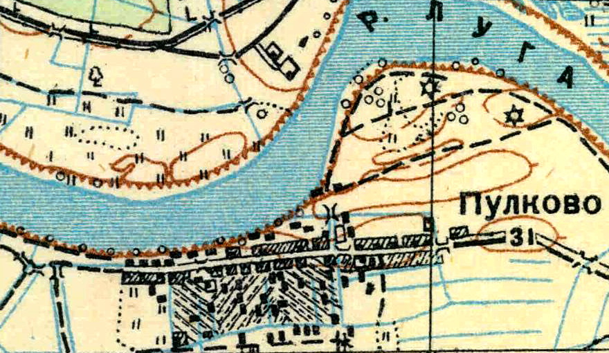 Топографическая карта Ленинградской области, квадрат О-35-21-Г-а (Орлы), деревня Пулково.